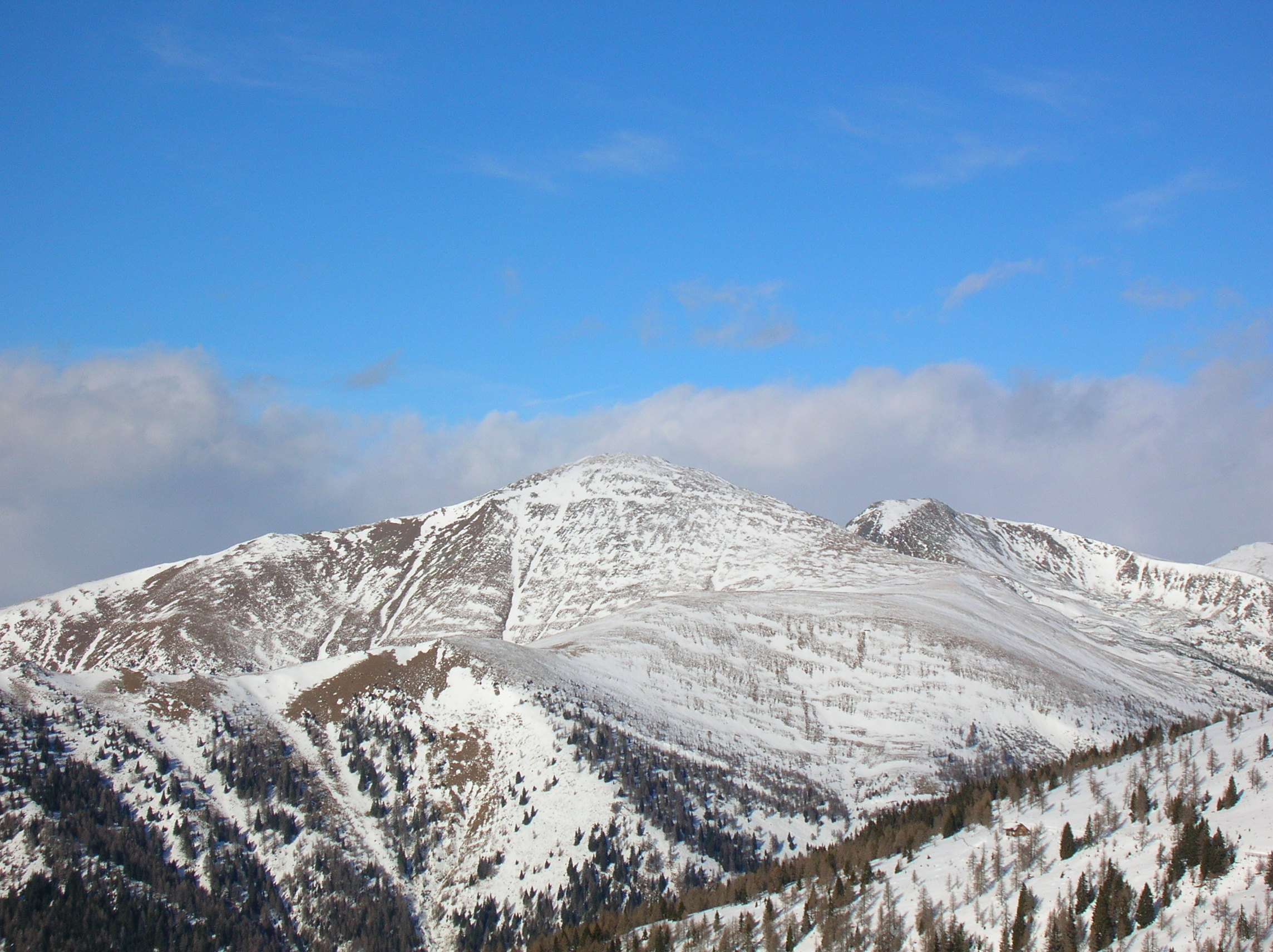 Nockberge, Großer Rosennock (2440m), rechts dahinter der Kleine Rosennock (2361m)